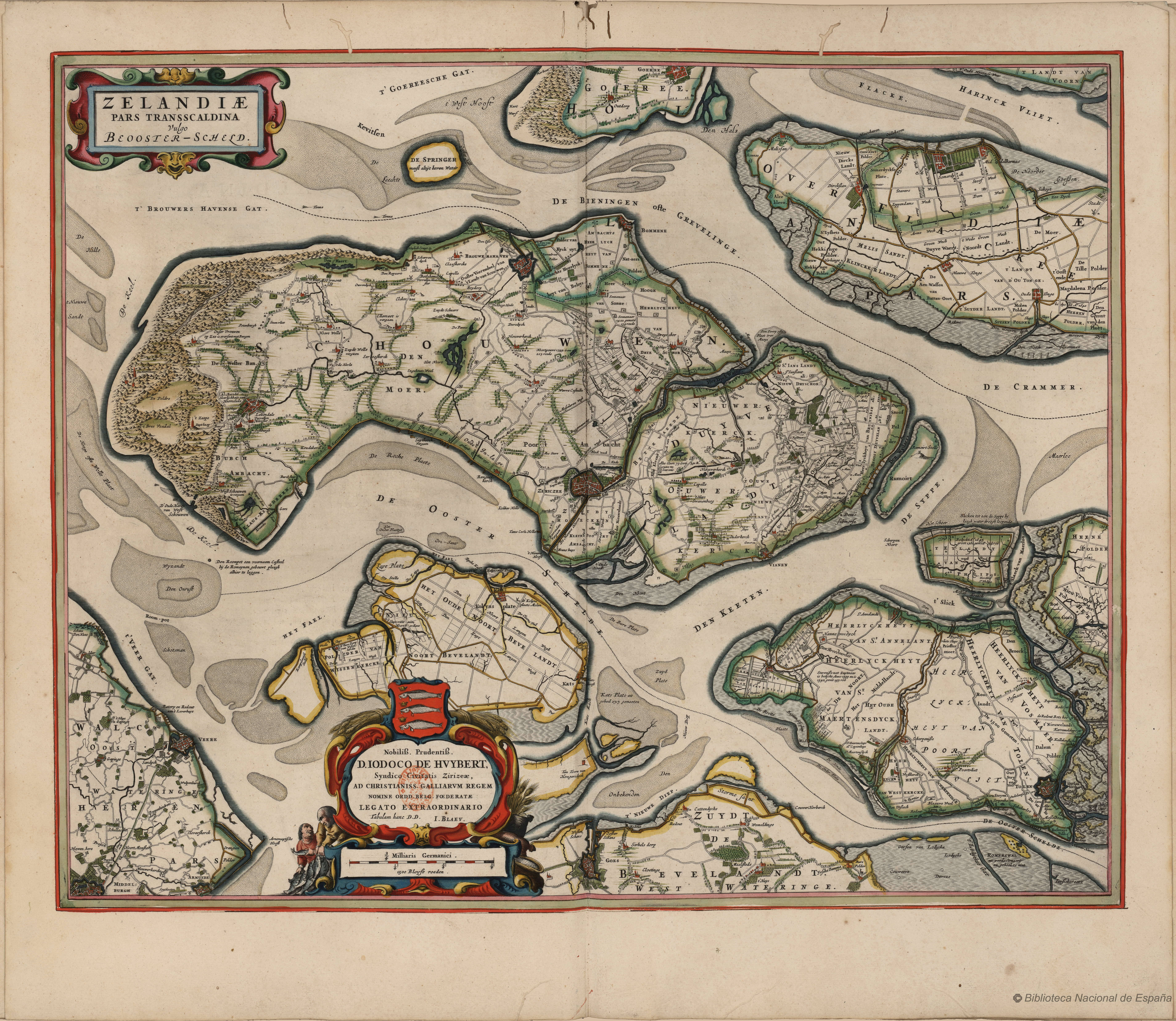 titel: Zelandiæ pars transscaldina vulgo Beooster-Scheld. Kaart van het eiland Schouwen Duiveland, Zeeland